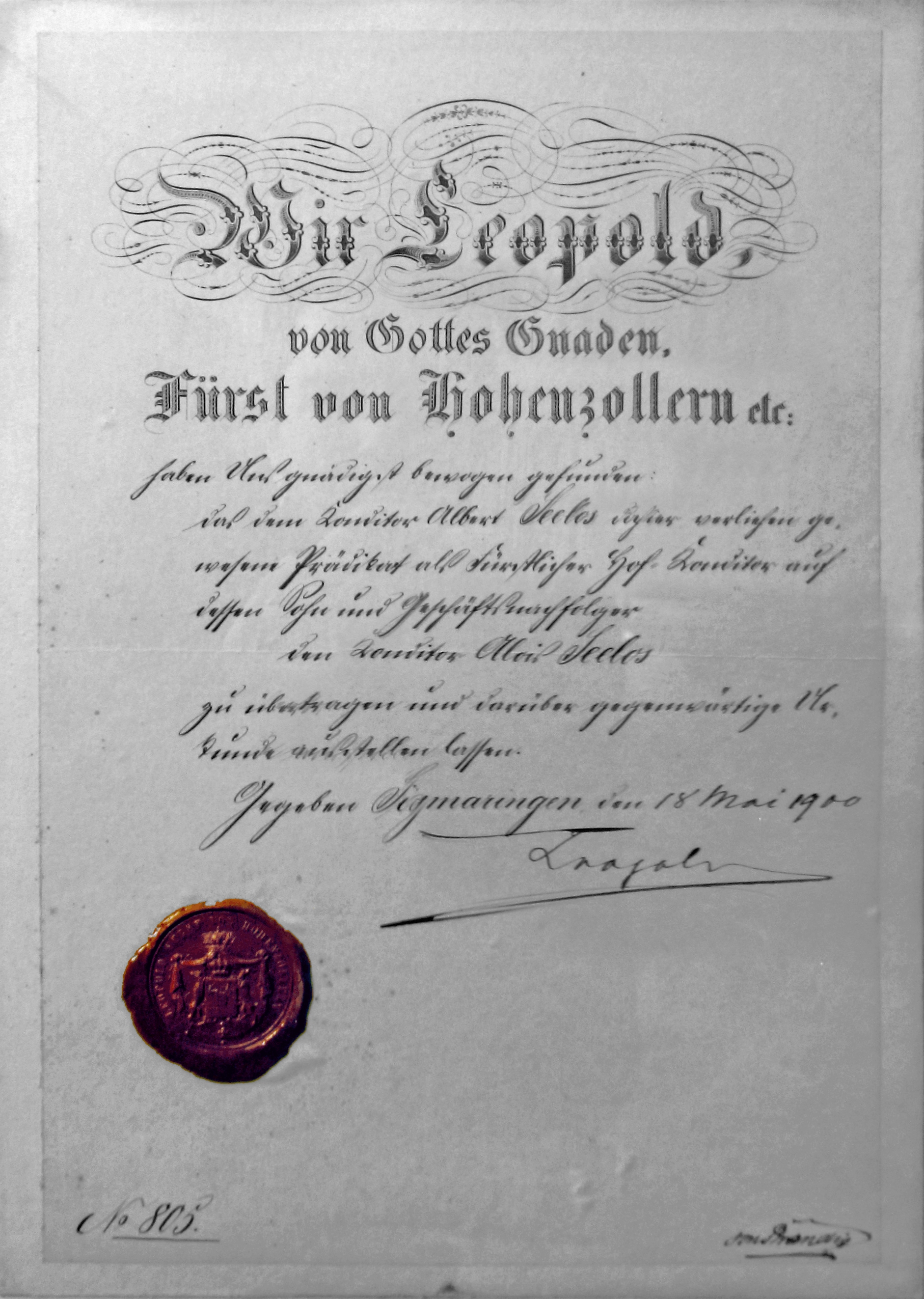 Hoflieferantendiplom an den Konditor Alois Seelos, 805. am 18. Mai 1900.